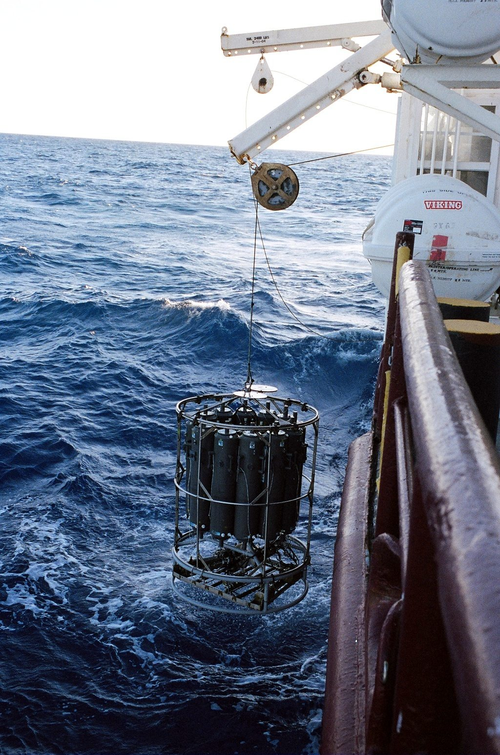 Lançamento de roseta ao bordo do R/V Gyre no Golfo do México